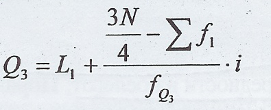 tret_kvartil_2012.jpg